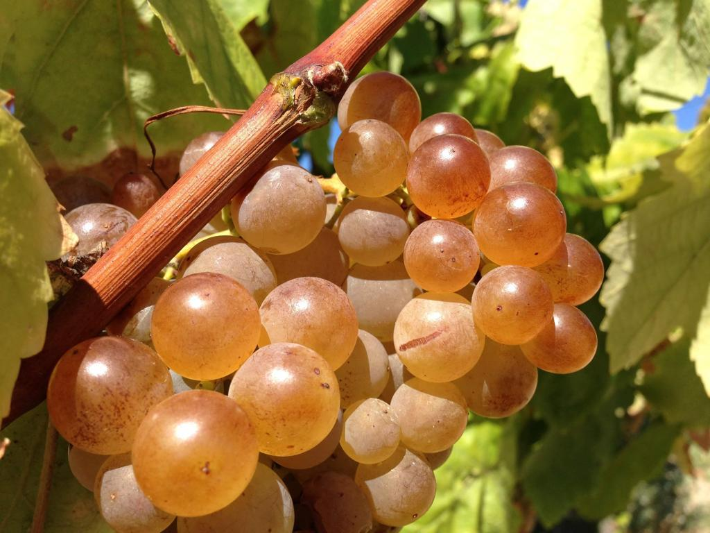 Varietat de raïm pansa blanca d'Alella